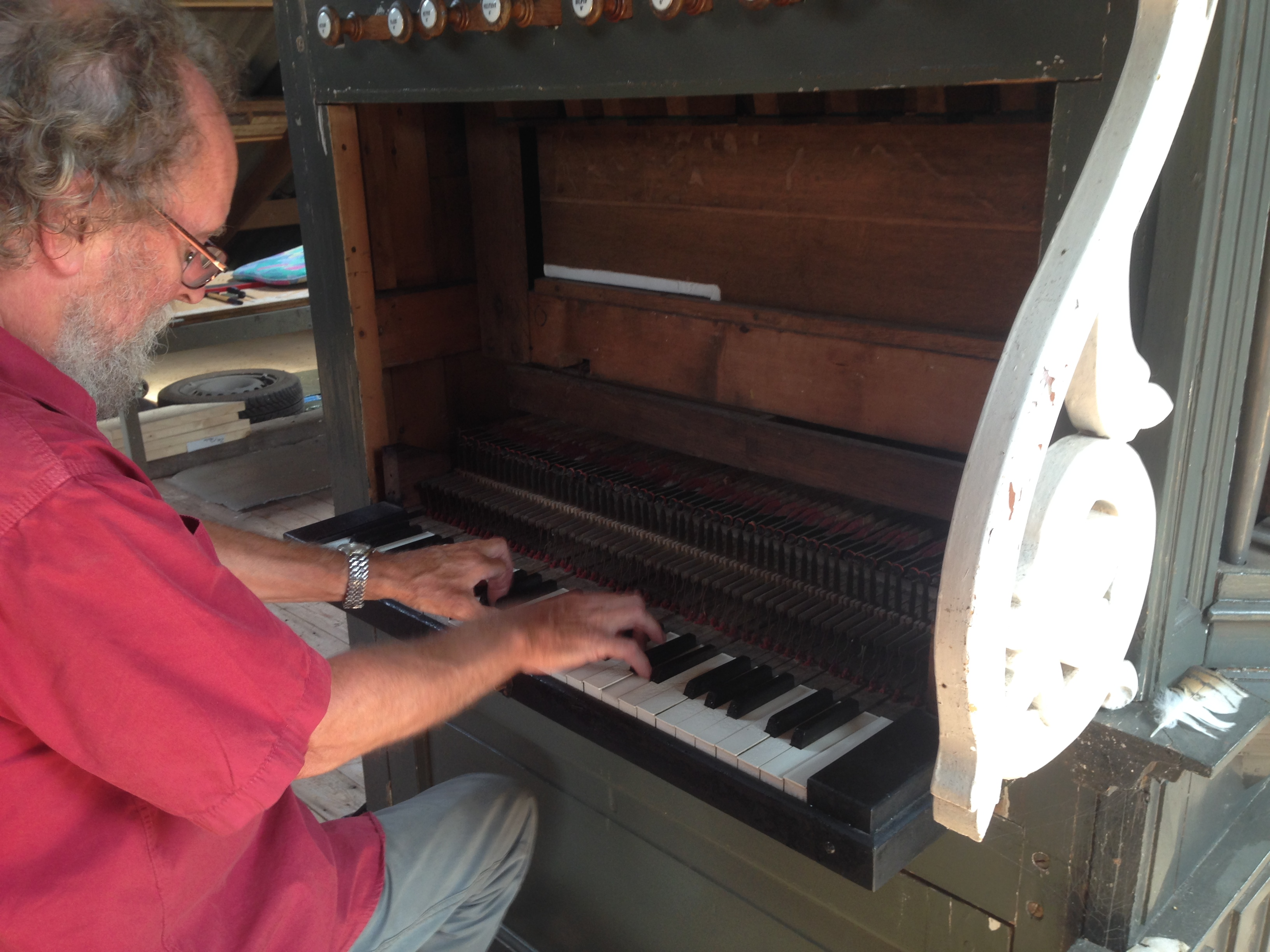 Harmonium Museum in Paasloo, Overijssel, Netherlands